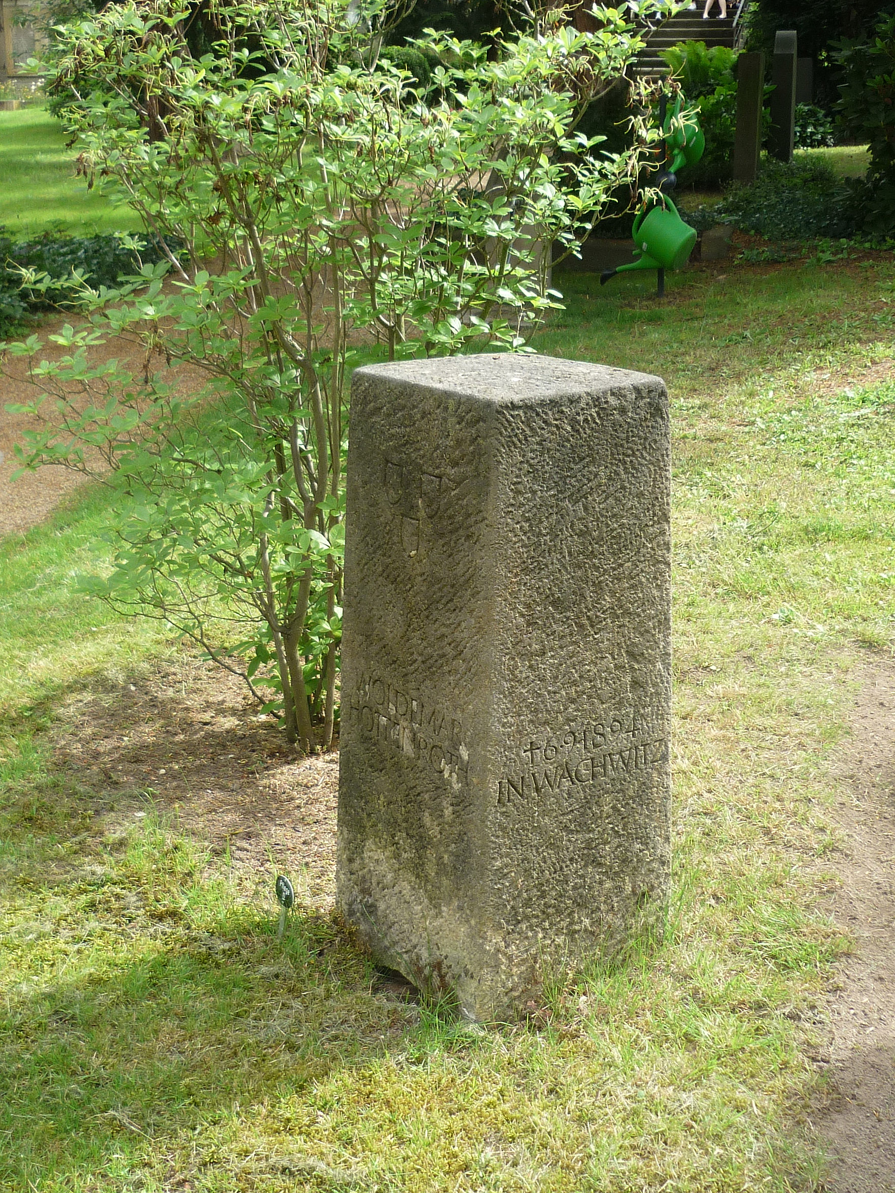 Loschwitzer Friedhof in Dresden-Loschwitz: Grabstätte Woldemar Hottenroth (1802–1894), Maler